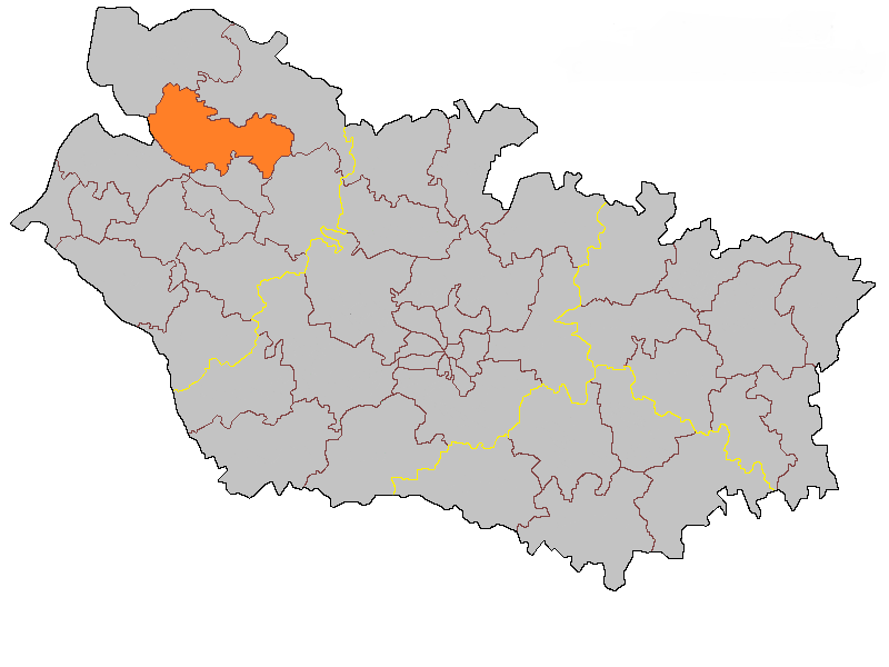 Кантон Нувьон на карте департамента Сомма